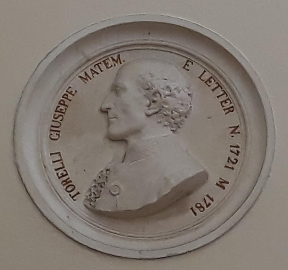 Effige di Giuseppe Torelli